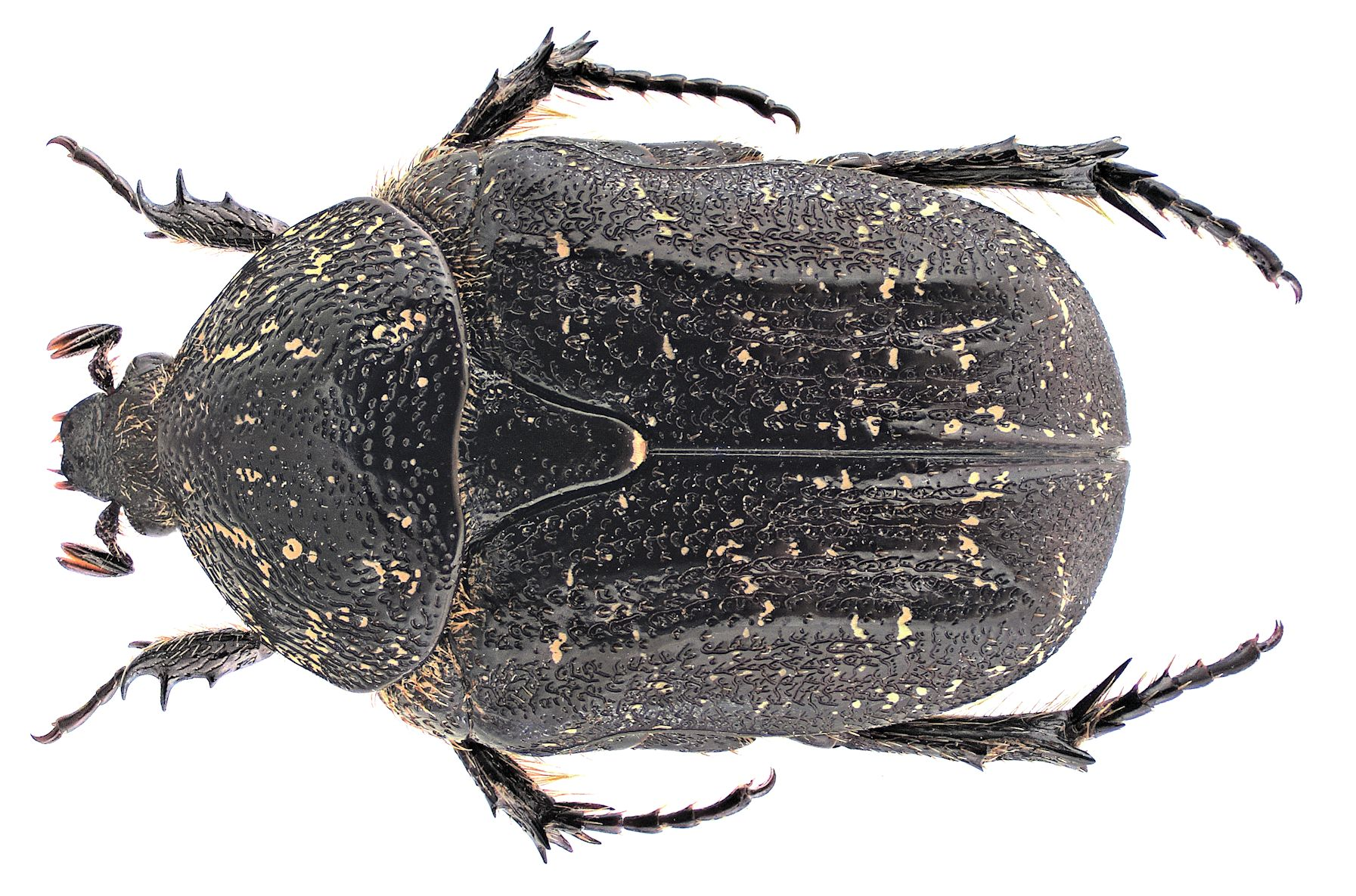 Familie: Scarabaeidae Grösse: 12 mm Verbreitung: südliches Afrika Fundort: Namibia, Etosha National Park leg.det. U.Schmidt, 1994 Foto: U.Schmidt, 2006